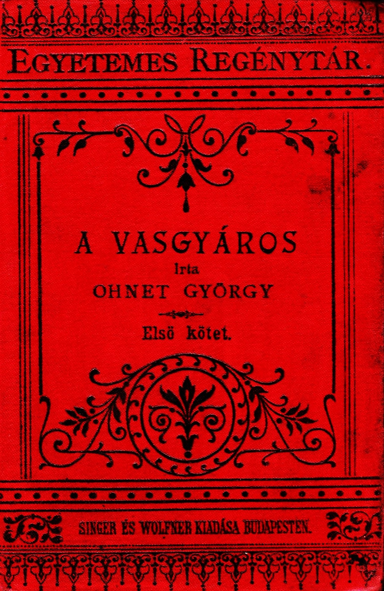 Ohnet György (George Ohnet): A vasgyáros, borítódísz szerzője nem ismert